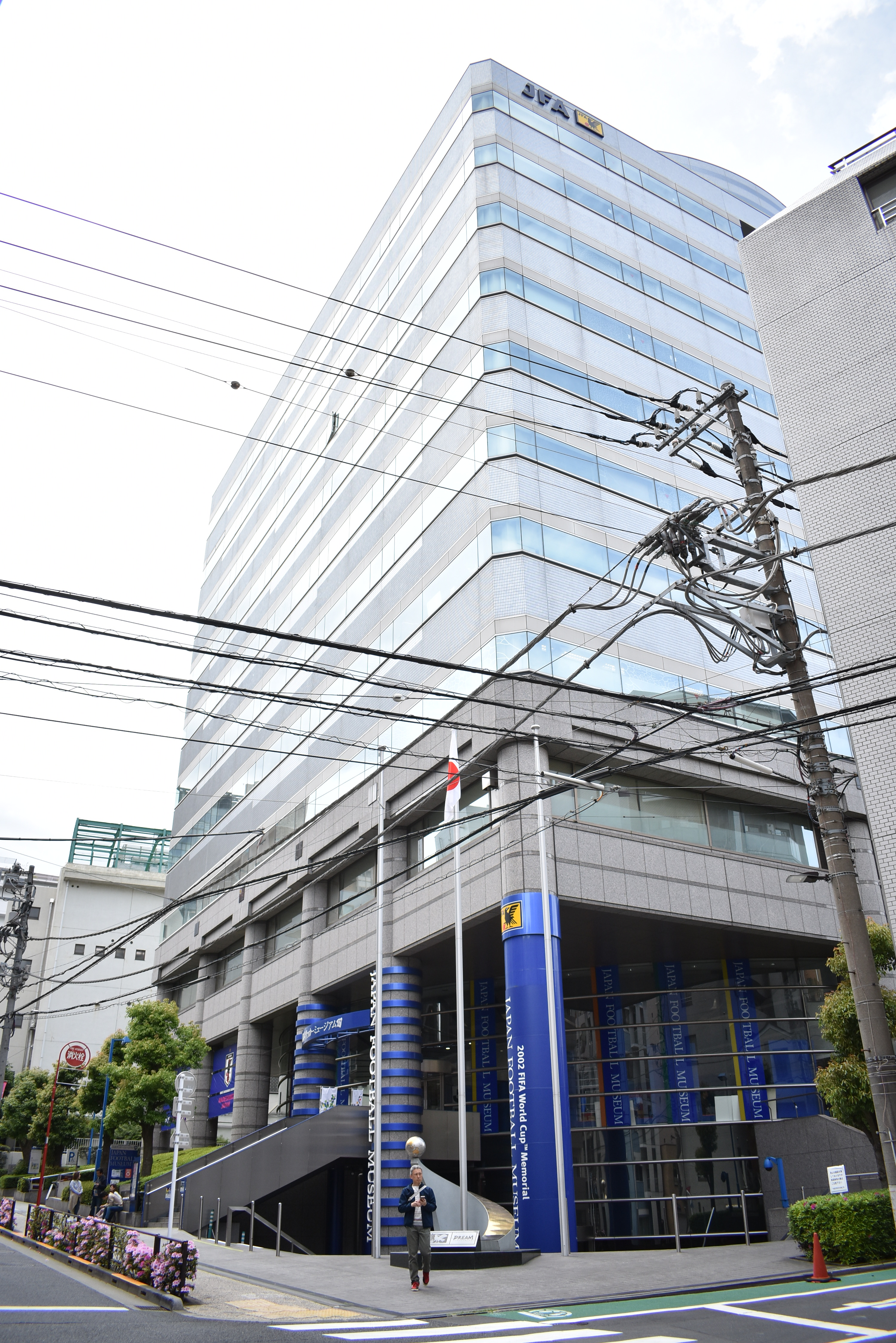 日本サッカーミュージアム Nikon D3400